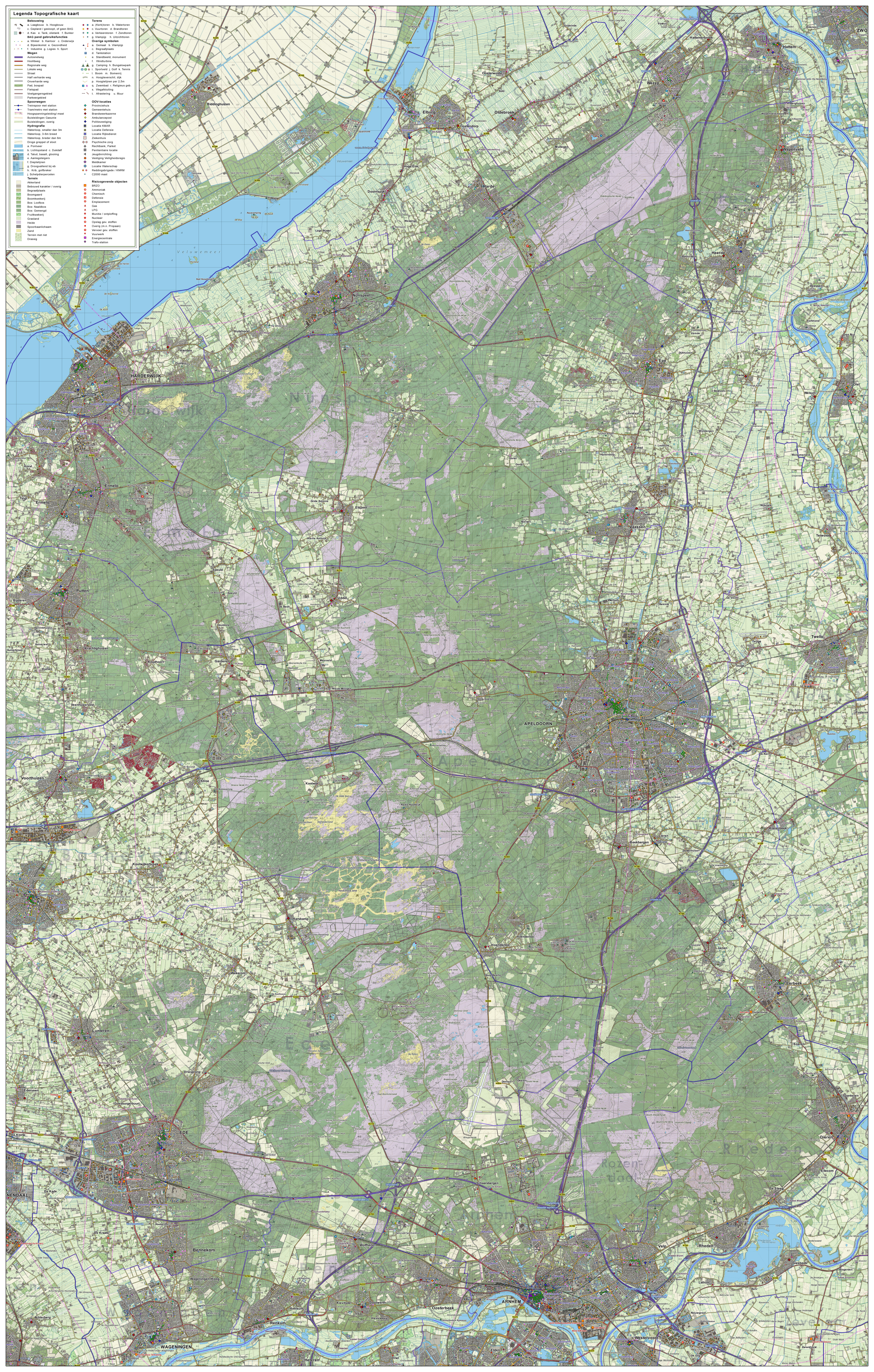 Topografisch beeld van het gebied "De Veluwe". Op basis van de GML open geodata van de BRT/Top10NL (basisregistratie Topografie, Kadaster 2011), vrijgegeven door Kadaster onder de Creative Commons BY licentie. Samenstelling en kleurenschema: Jan-Willem van Aalst, met QuantumGIS en Photoshop.